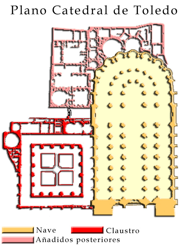 Plano de la catedral de Toledo - España autor user:papix